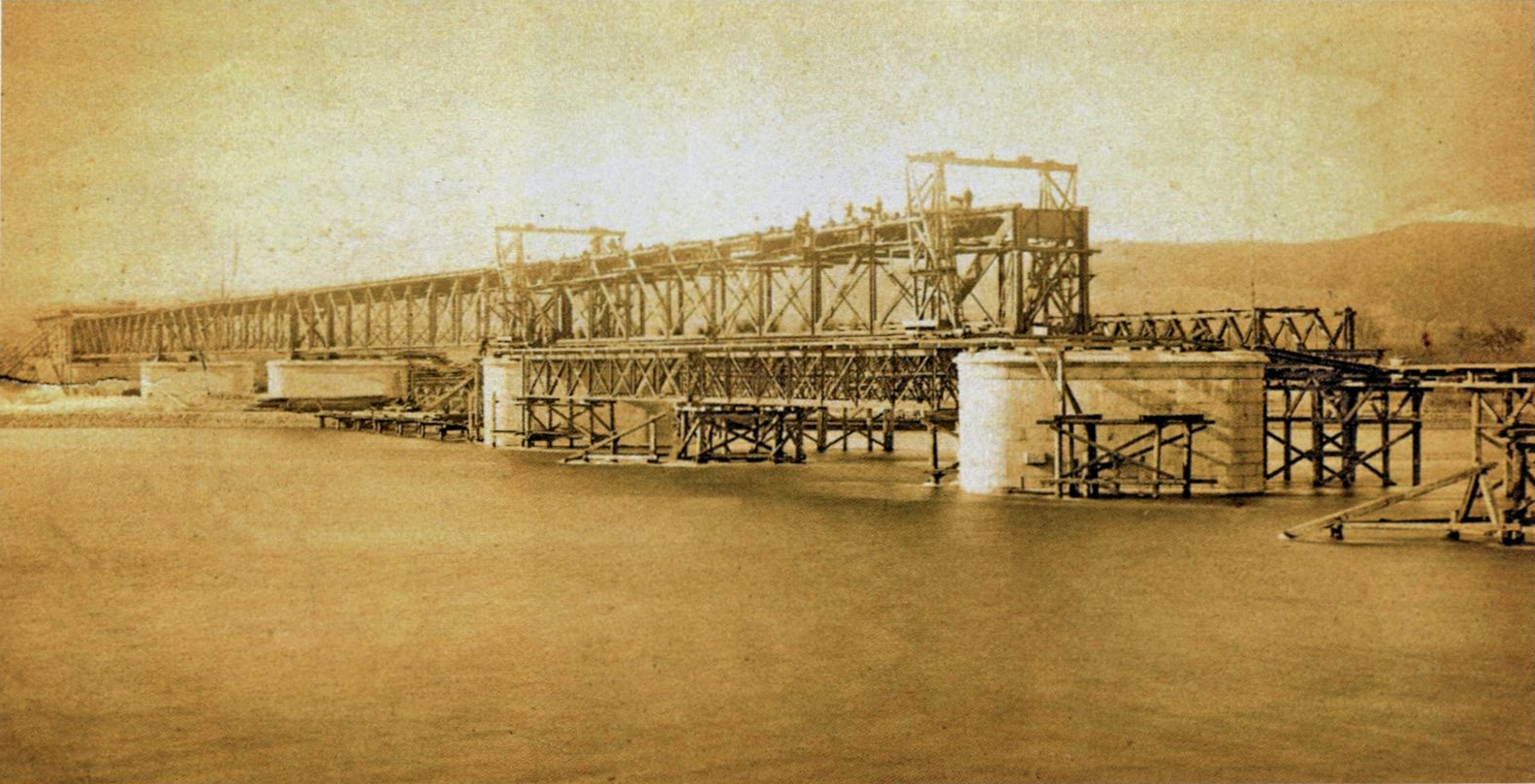 Bau der Eisenbahnbrücke über den Inn zwischen Simbach und Braunau. Blick von Süden vom österreichischen Ufer.